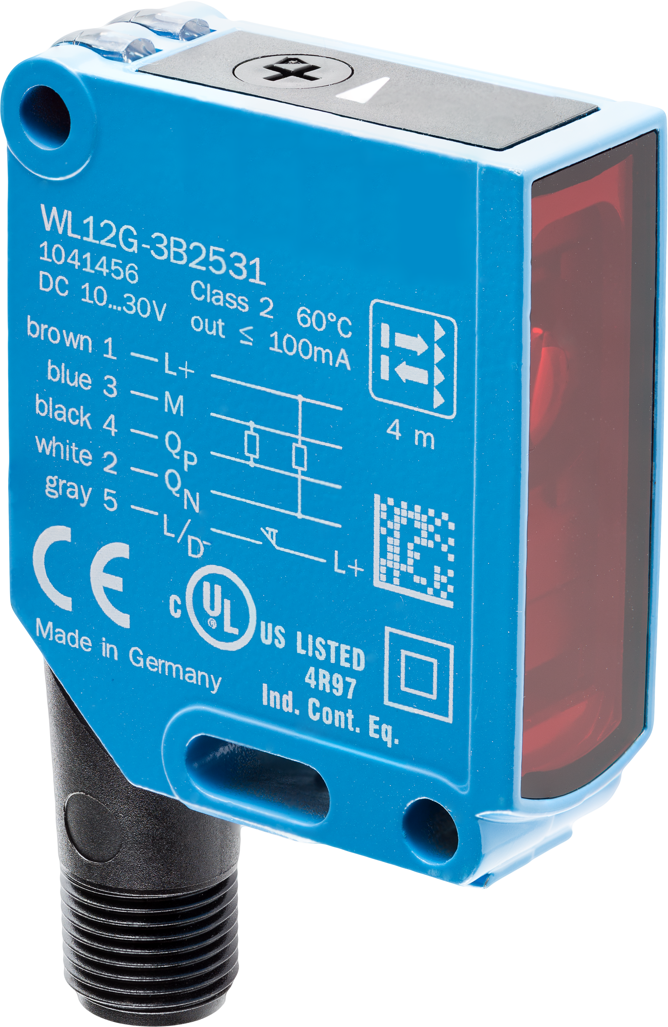 SICK WL12G-3B2531 Reflexlichtschranke